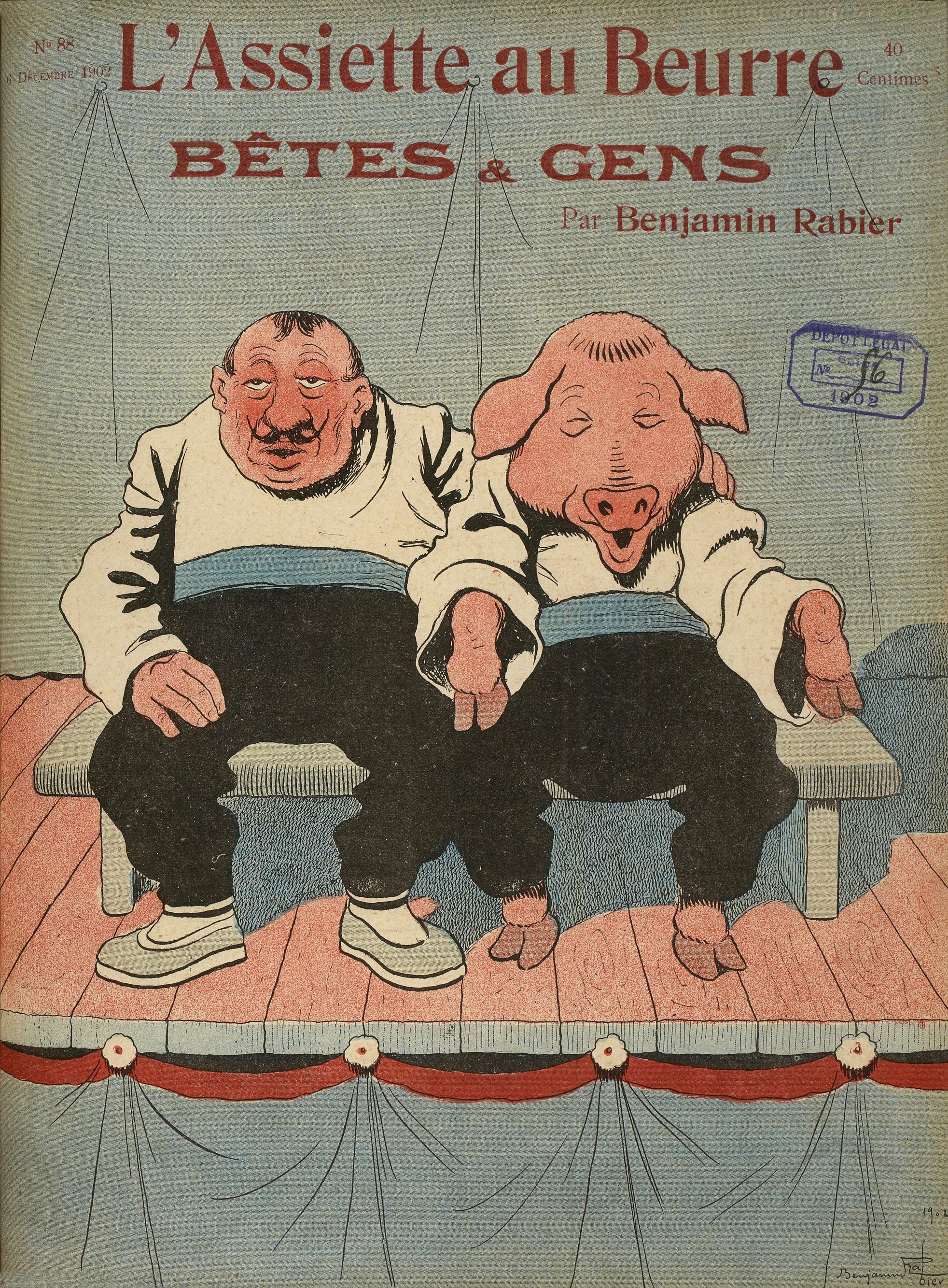 Couverture du numéro 88 du 6 décembre 1902.